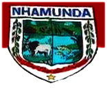 Brasão de Nhamundá.